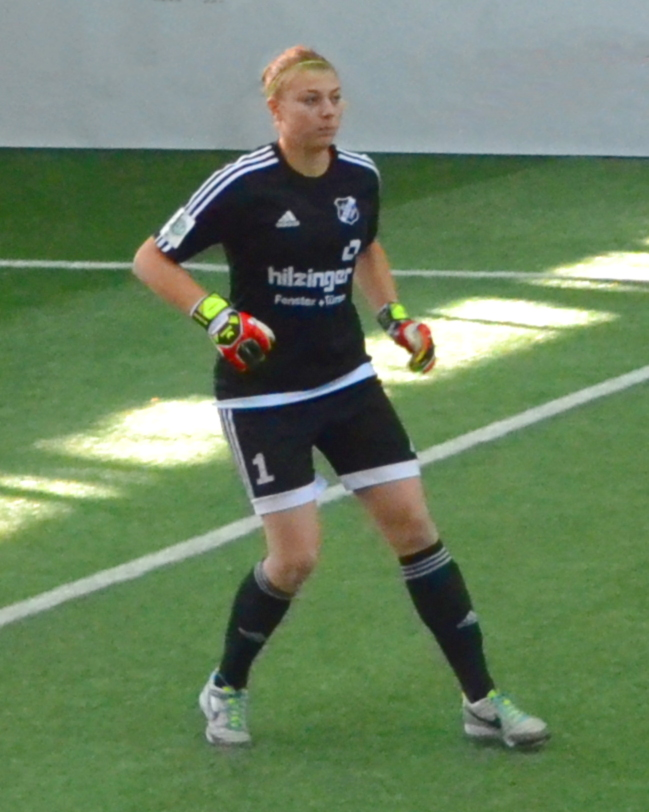 Carina Schlüter (SC Sand) beim SAP Frauen-FußballCup 2017